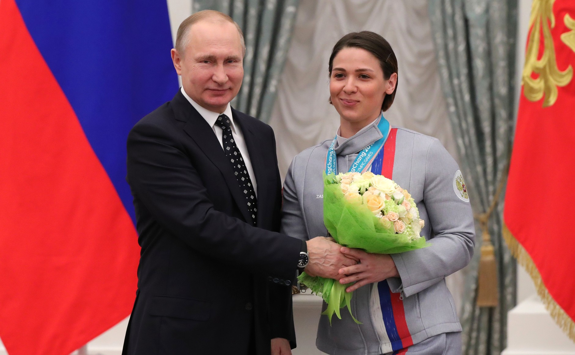 Президент России Владимир Путин с бронзовым призёром Игр по лыжным гонкам Мартой Зайнулиной